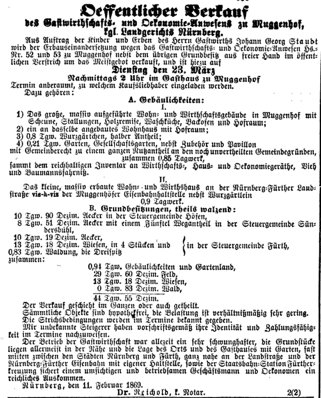 Verkaufsanzeige des Gastwirtschafts- und Ökonomie-Anwesens zu Muggenhof (jetzt Adolf-Braun-Straße 35 mit 37). Inserat in der Augsburger Abendzeitung, Nr. 76, Zweites Blatt, 17. März 1869.